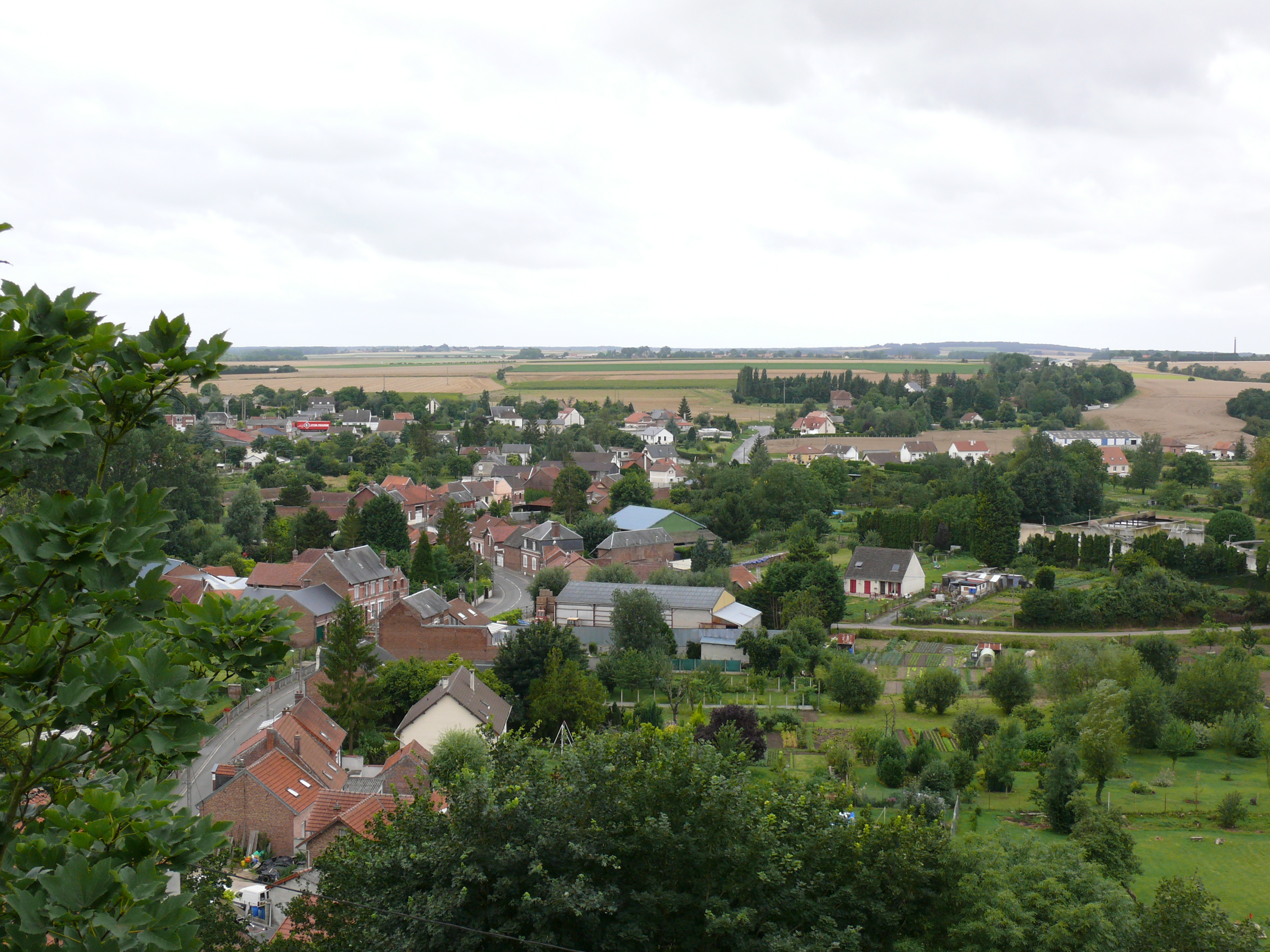 Montdidier : Vue sur la campagne depuis le belvédère de l'église Saint-Pierre